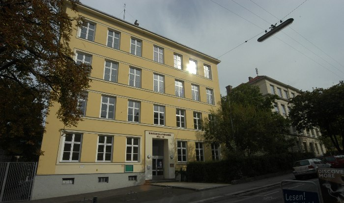 Schulhaus in der Singrienergasse in Wien-Meidling - erstes TV-Studio des ORF. Ab dem Schuljahr 1972/73 befand sich in diesem Gebäude (und im Nebengebäude Singrienergasse 19) das Bundesrealgymnasium (BRG) XII., das aus dem Schulgebäude Erlgasse hierher übersiedelt war und nach 1998 nach Inzersdorf verlegt wurde.